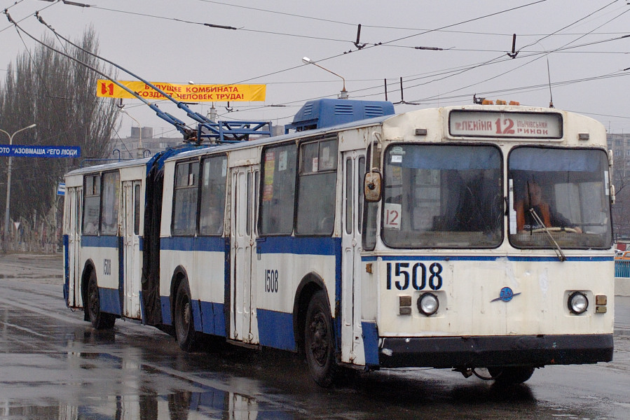 ZiU-10 1508 in Mariupol